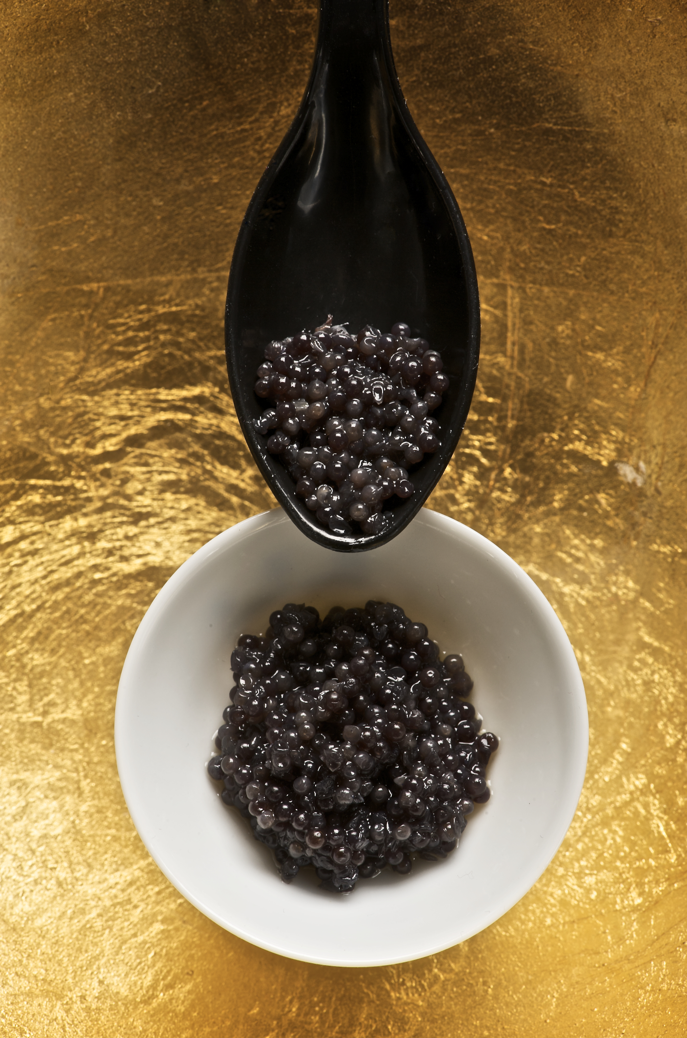 Black Beluga caviar.